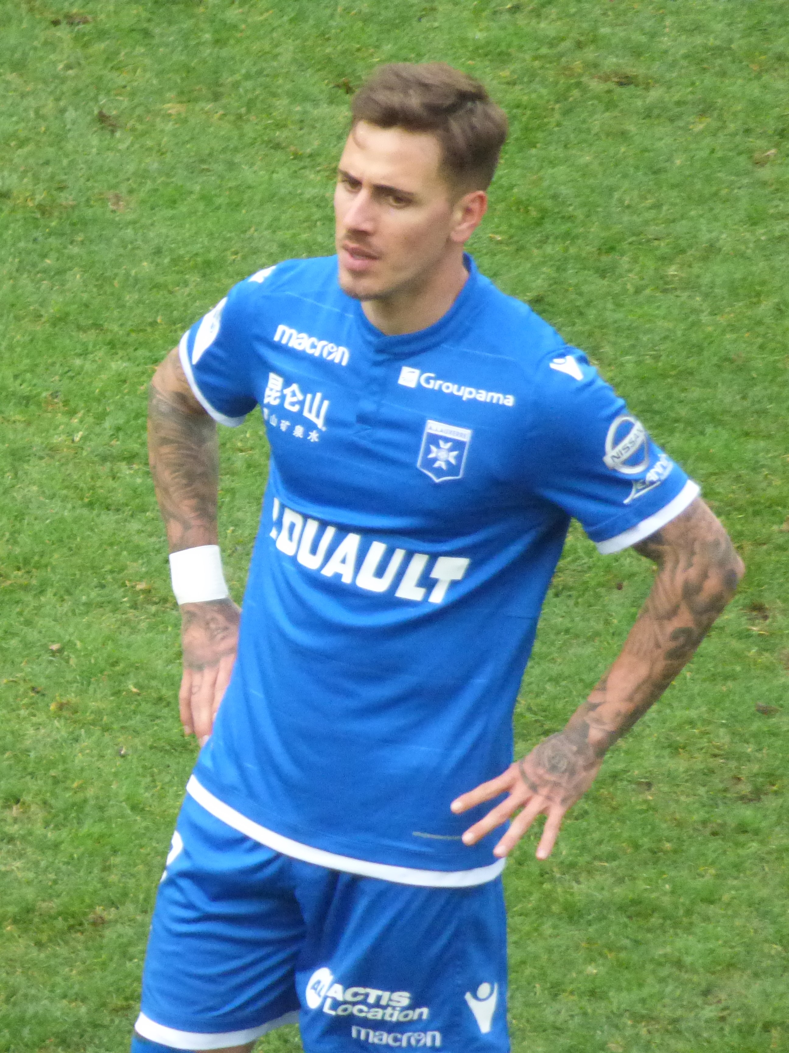 Daniel Mancini lors du match RC Lens - AJ Auxerre, comptant pour la 28ème journée du championnat de France de football de Ligue 2 2018-2019, le 9 mars 2019 au Stade Bollaert-Delelis.